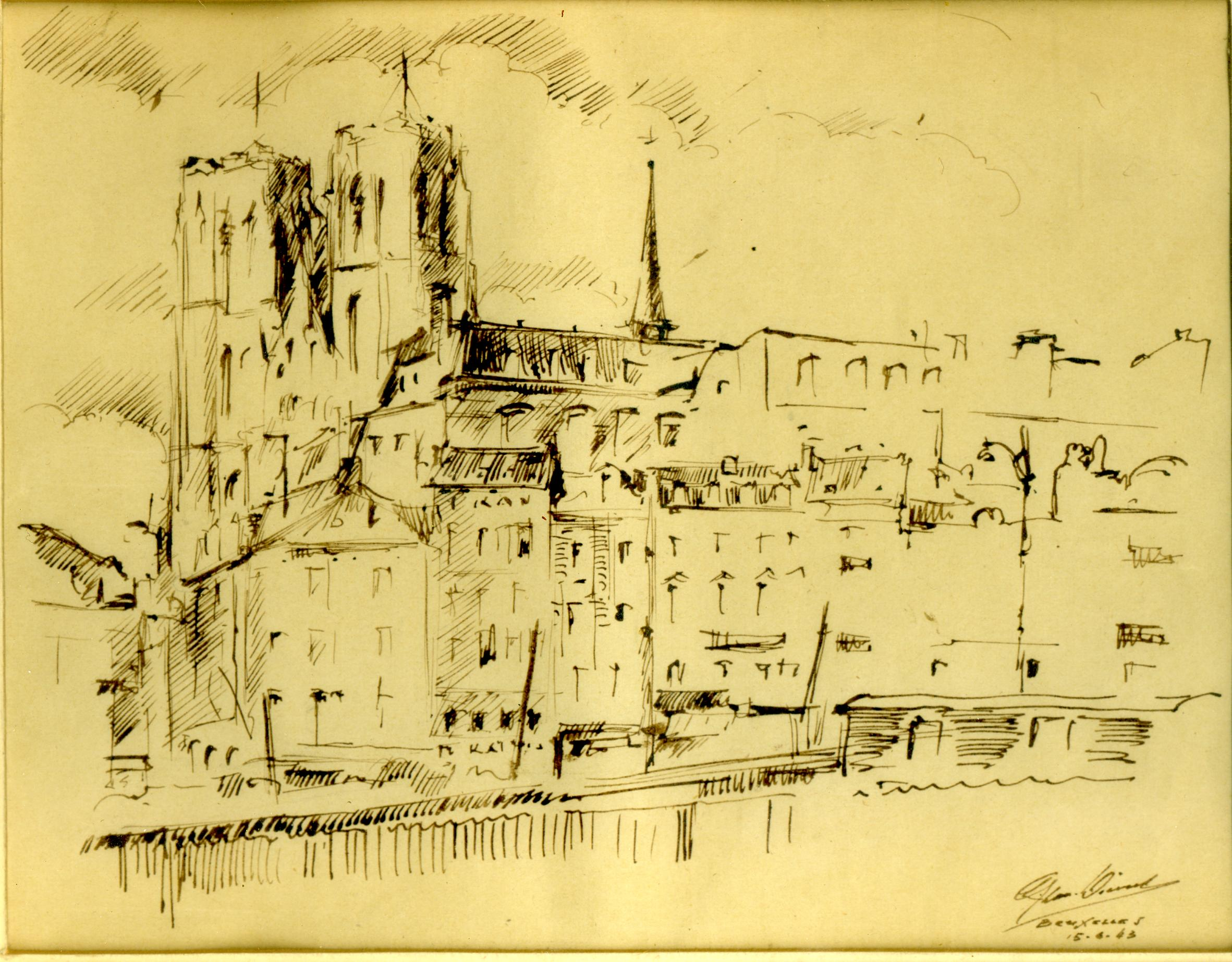 Église de Sainte Gudule, sépia par Léon van Dievoet, 1943